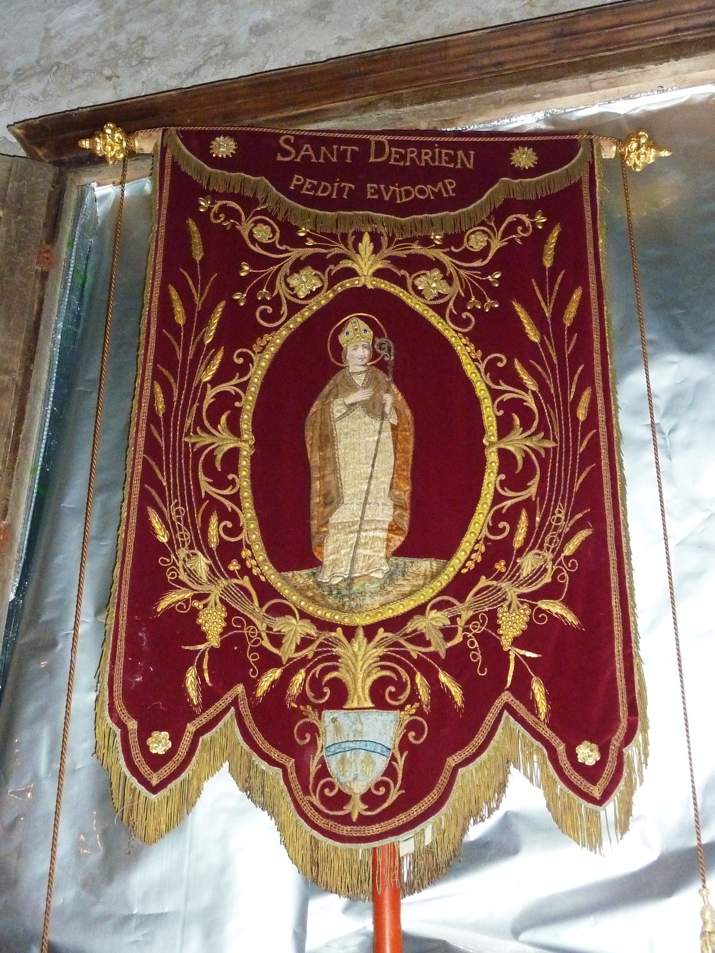 Commana Eglise Saint-Derrien bannière de saint Derrien